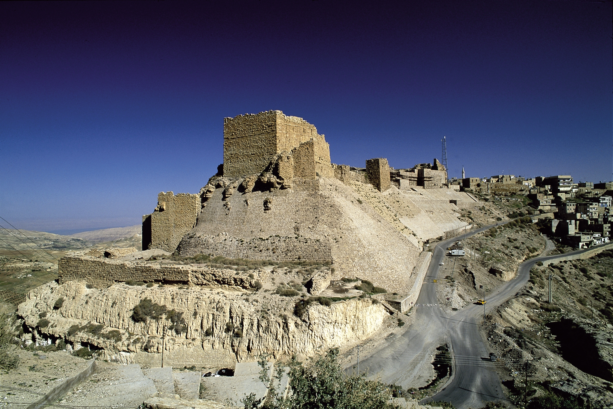 قلعة الكرك في الأردن